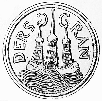 Randers' købstadssegl